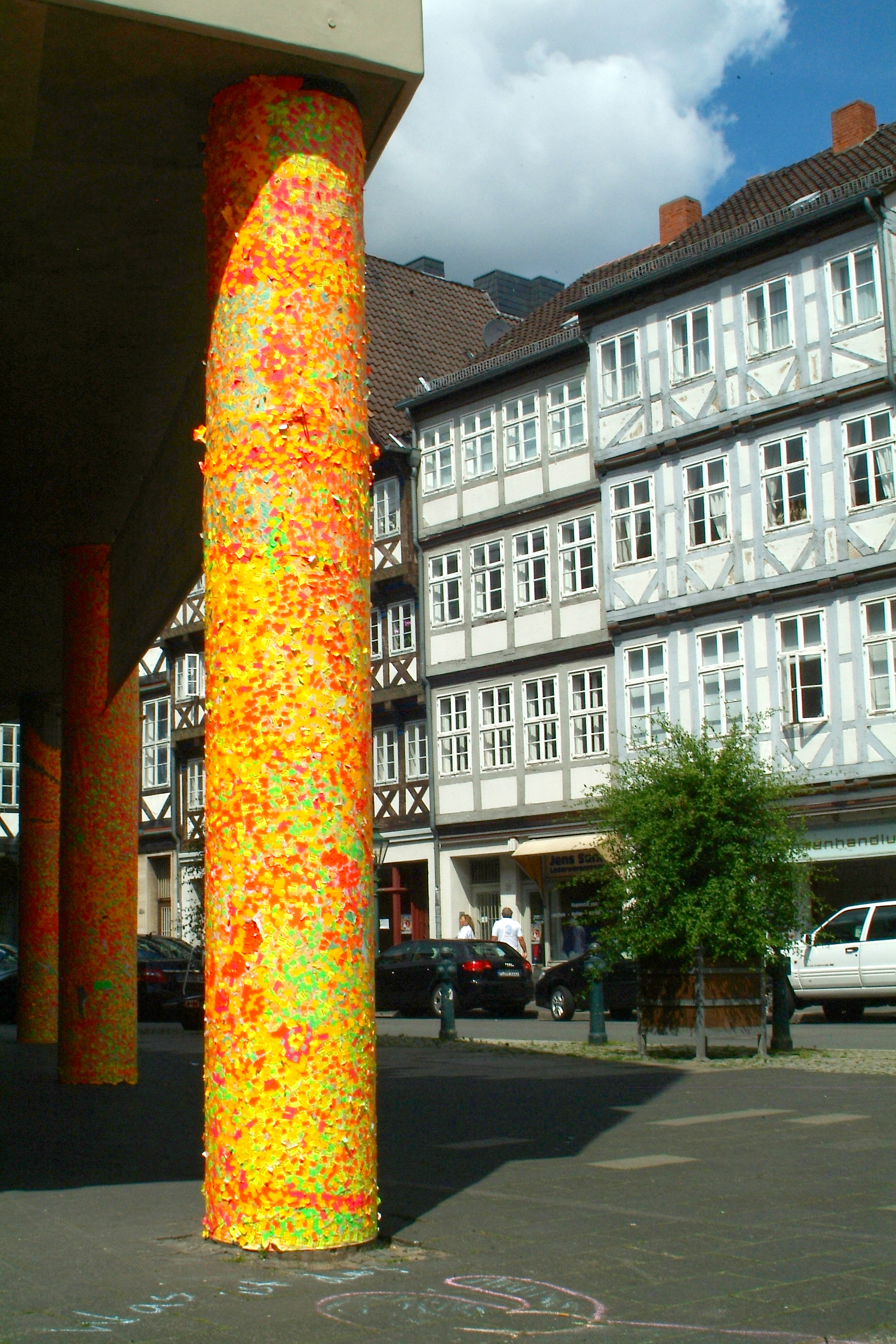 Ein Säule vom Historischen Museum Hannover, Ecke Burgstraße, beklebt mit Preisetiketten, im Rahmen von Strich-Code, eine "Schwarmkunstaktion" zur Hinterfragung von käuflicher Sexualität und käuflicher Kunst ...